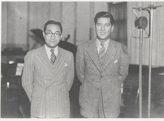 1938年の「愛馬の唄」スチールをスキャン